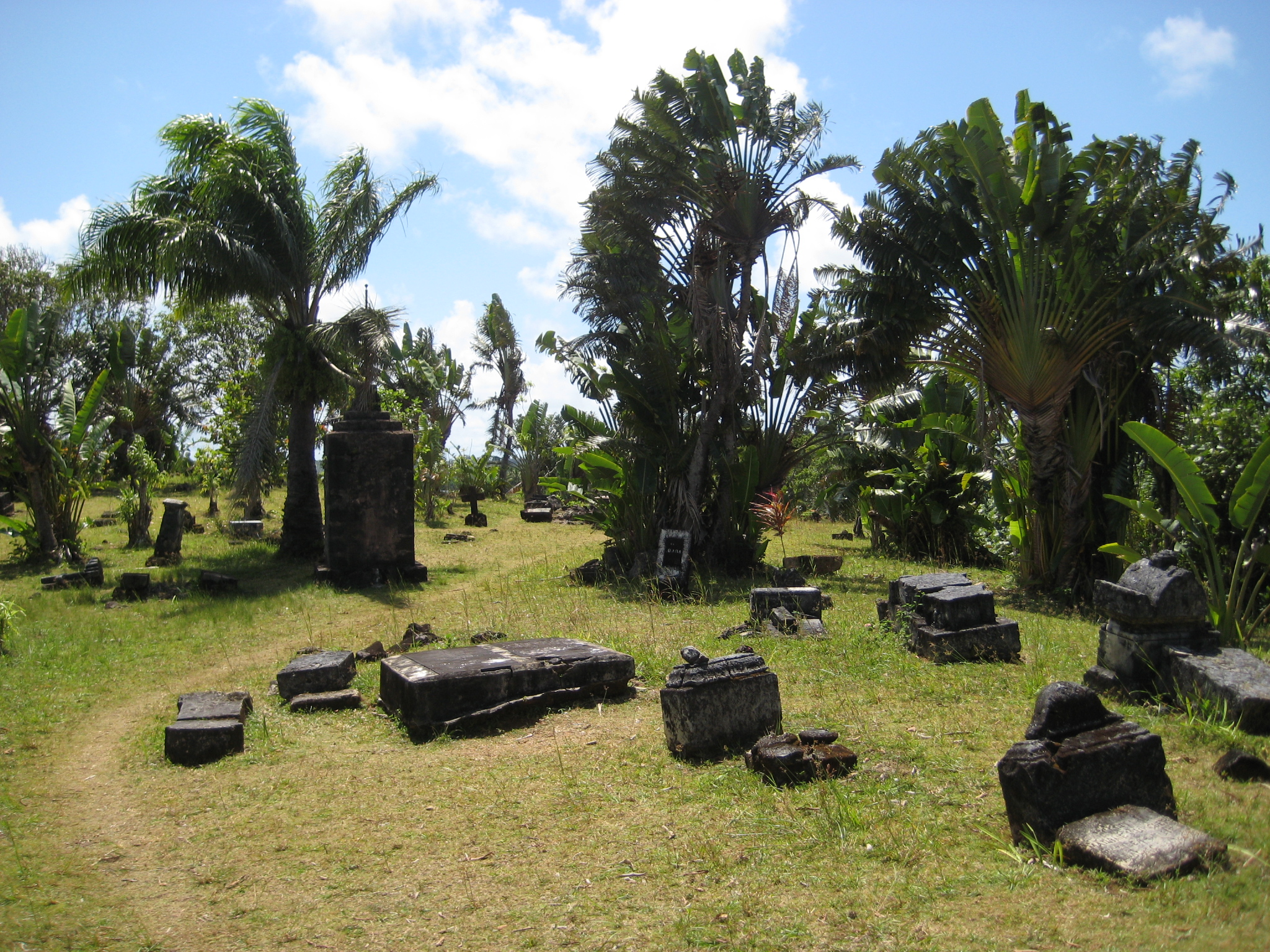 Pirate Cemetery, �le Sainte-Marie